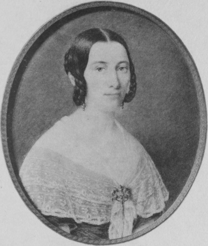 Porträt, Luise Gaedechens, geb. von Sienen. Miniatur von Leo Lehmann